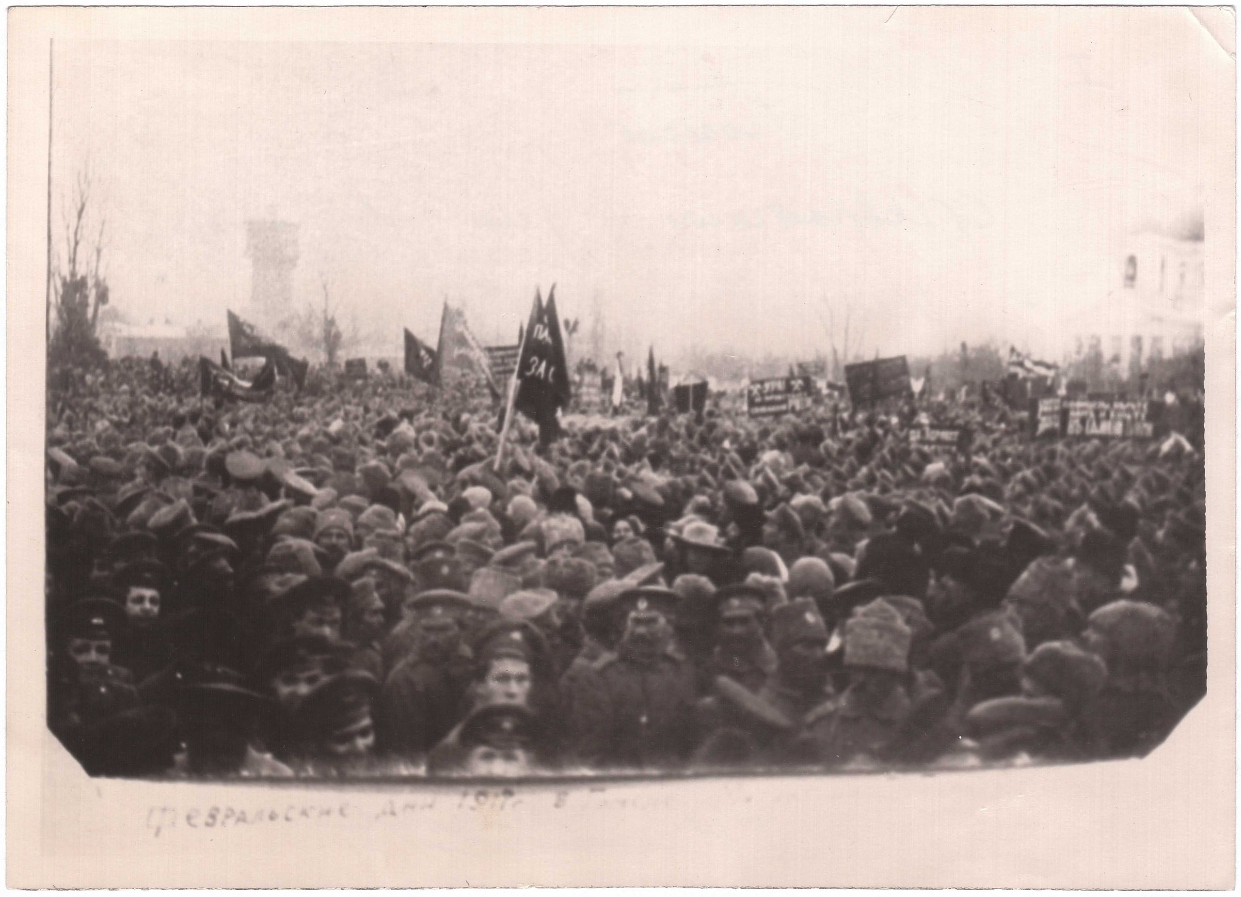 Беларуская (тарашкевіца): Гомель (Homiel), пляц Рынак (plac Rynak) або Саборны (plac Saborny). Царква Сьвятых Апосталаў Пятра і Паўла. Мітынг